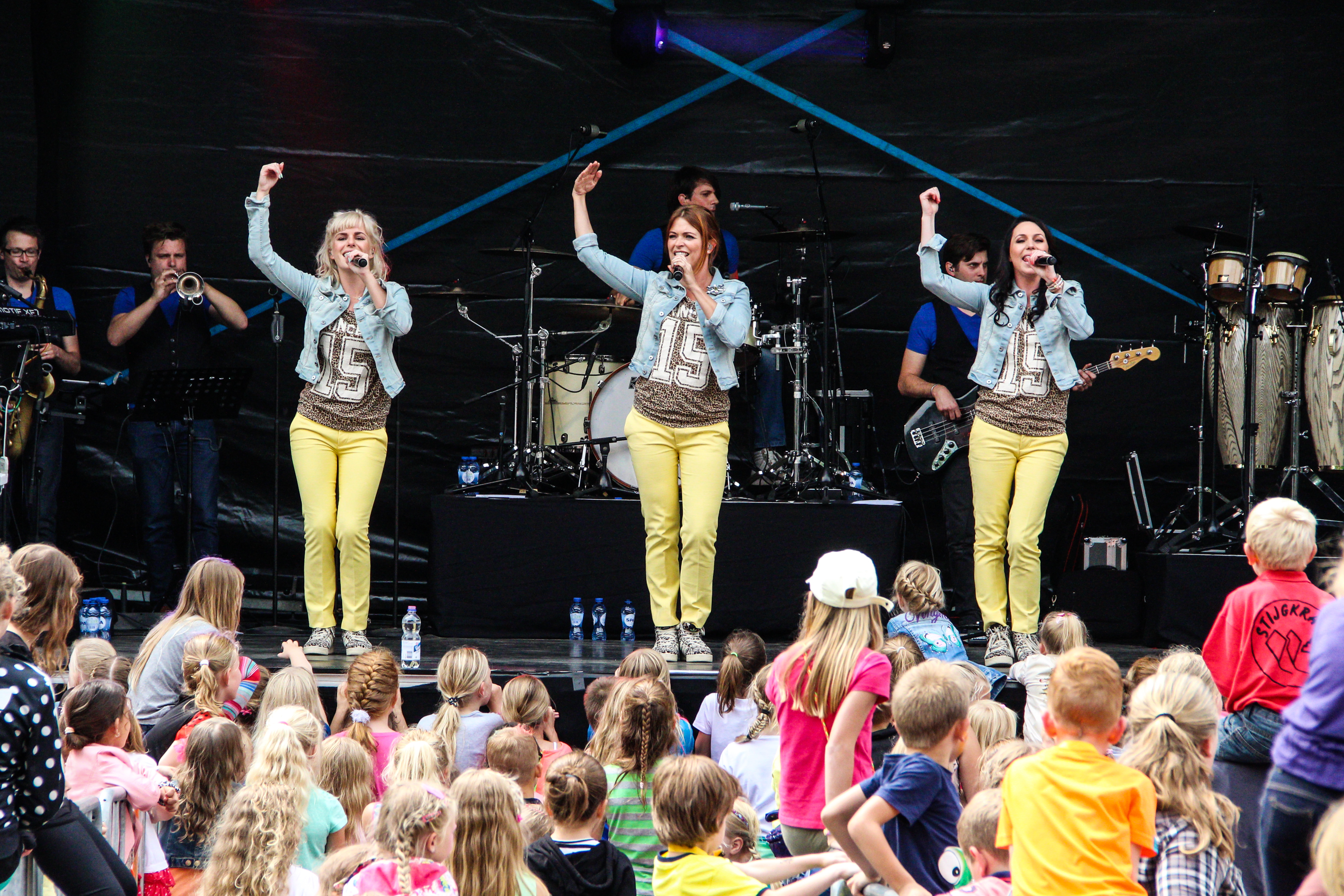 K3 tijdens Alles Kids in Drenthe 2014